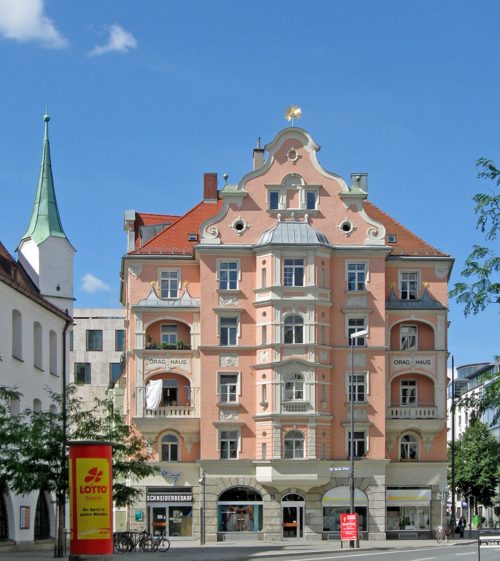 ORAG-Haus - Oberanger 9 - 80311 München - Jakobsplatz, dreiseitig freistehendes Neubarockhaus, errichtet 1896-97 von Johann und Adam Graessel und Max Krauss - Ansicht von Osten - Haus der Bayerischen Schneidereigenossenschaft - Sie wurde 1881 gegründet und beliefert Maßschneider, Schulen, Theater und Opernhäuser sowie private Kunden, in diesem Ladengeschäft, mit Stoffen, Futter, Einlagen, Knöpfen, Fäden, Reißverschlüssen etc. - eine Tafel kündet davon, dass hier einmal ein Bad war: "Ein Bad vor Zeiten hier bestand, Gighanbad war es genannt".